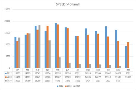 Účinnost SASR